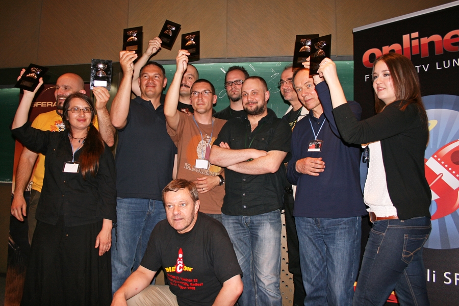 Sferakon 2011.